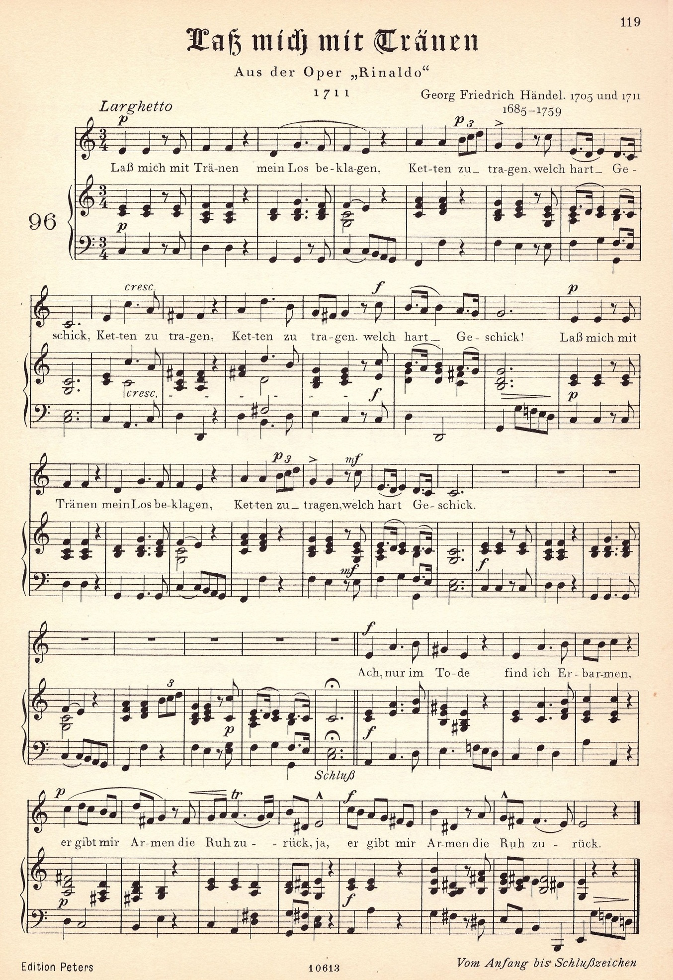 Händels Arie Lascia ch’io pianga mit deutschem Text Lass mich mit Tränen, Satz für Singstimme und Klavier